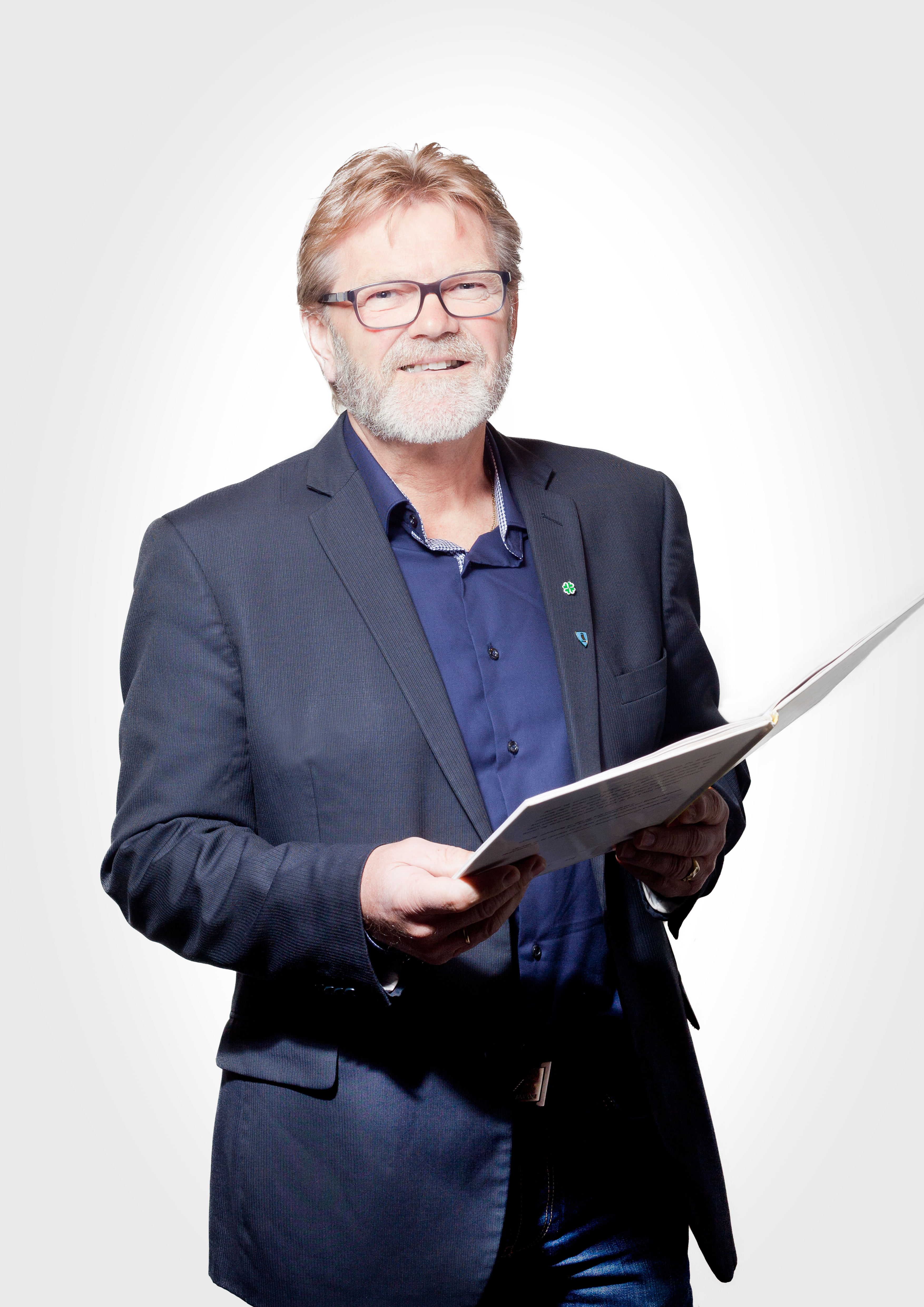 Ordfører Bjørn Skjelstad fra Verran, Nord-Trøndelag. Bildet er tatt i forbindelse med Nord-Trøndelag fylkesbiblioteks kampanje "Leseambassadører"